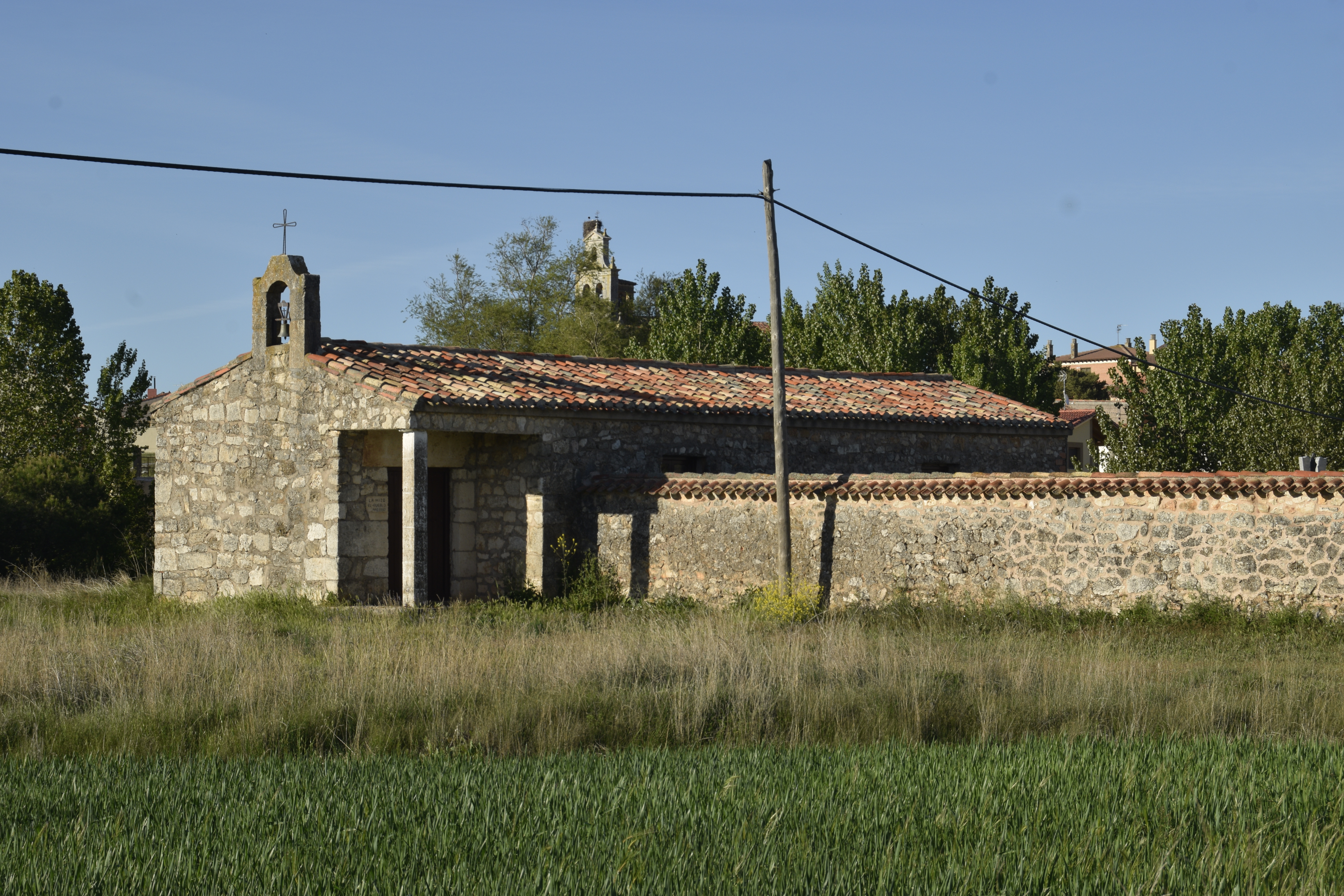 Tapia exterior del cementerio de Torrecilla del Monte (Burgos) junto a la Ermita de San Pelayo.